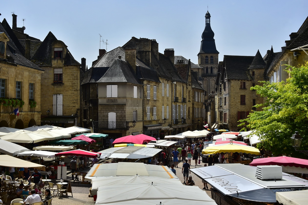 Marché de Sarlat-la-Caneda